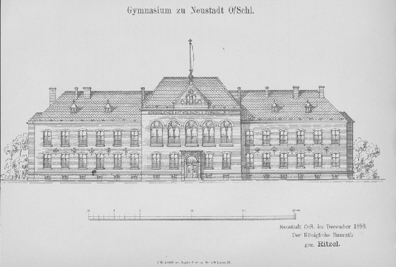 Widok szkoły